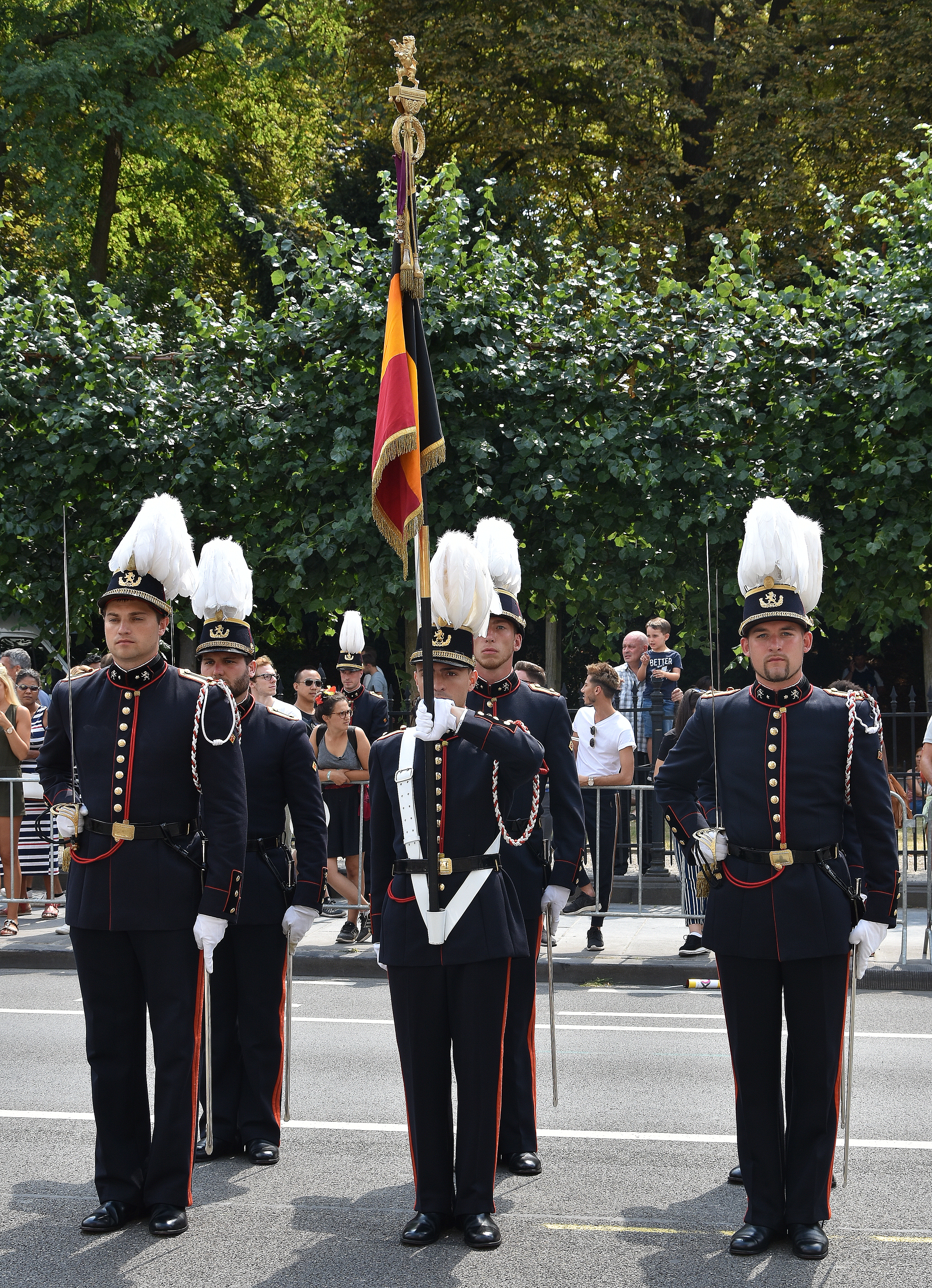 Koninklijke Militaire School (België) - Nationaal defilé 21-07-2018 14-57-51 This photo of immaterial heritage has been taken in the Brussels Capital Region